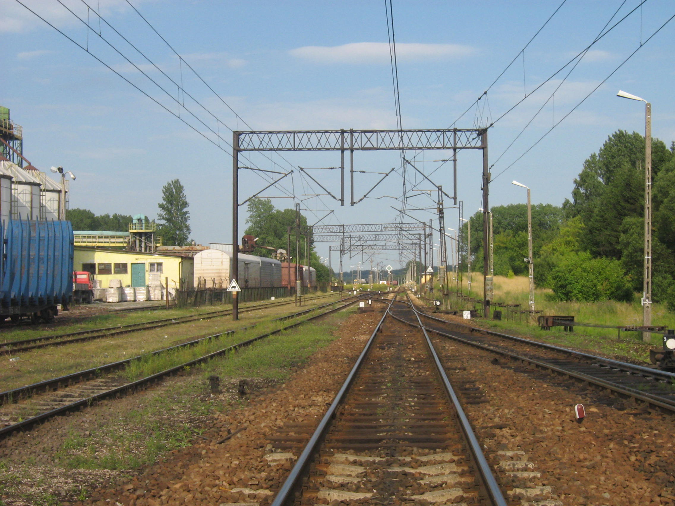 Linia kolejowa nr 6 w Sokółce.